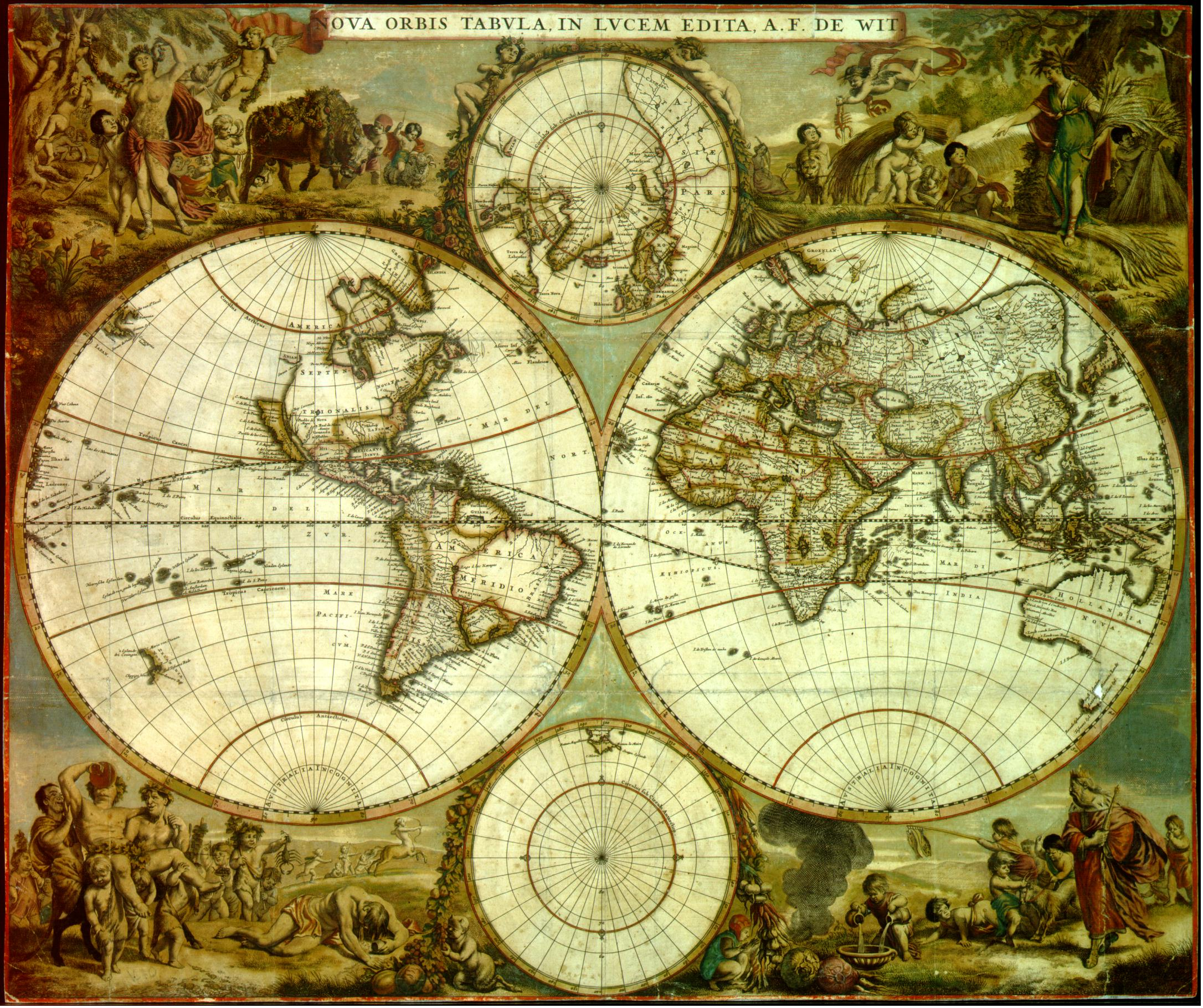 Nova Orbis Tabula in Lucem Edita Text (French/en française)